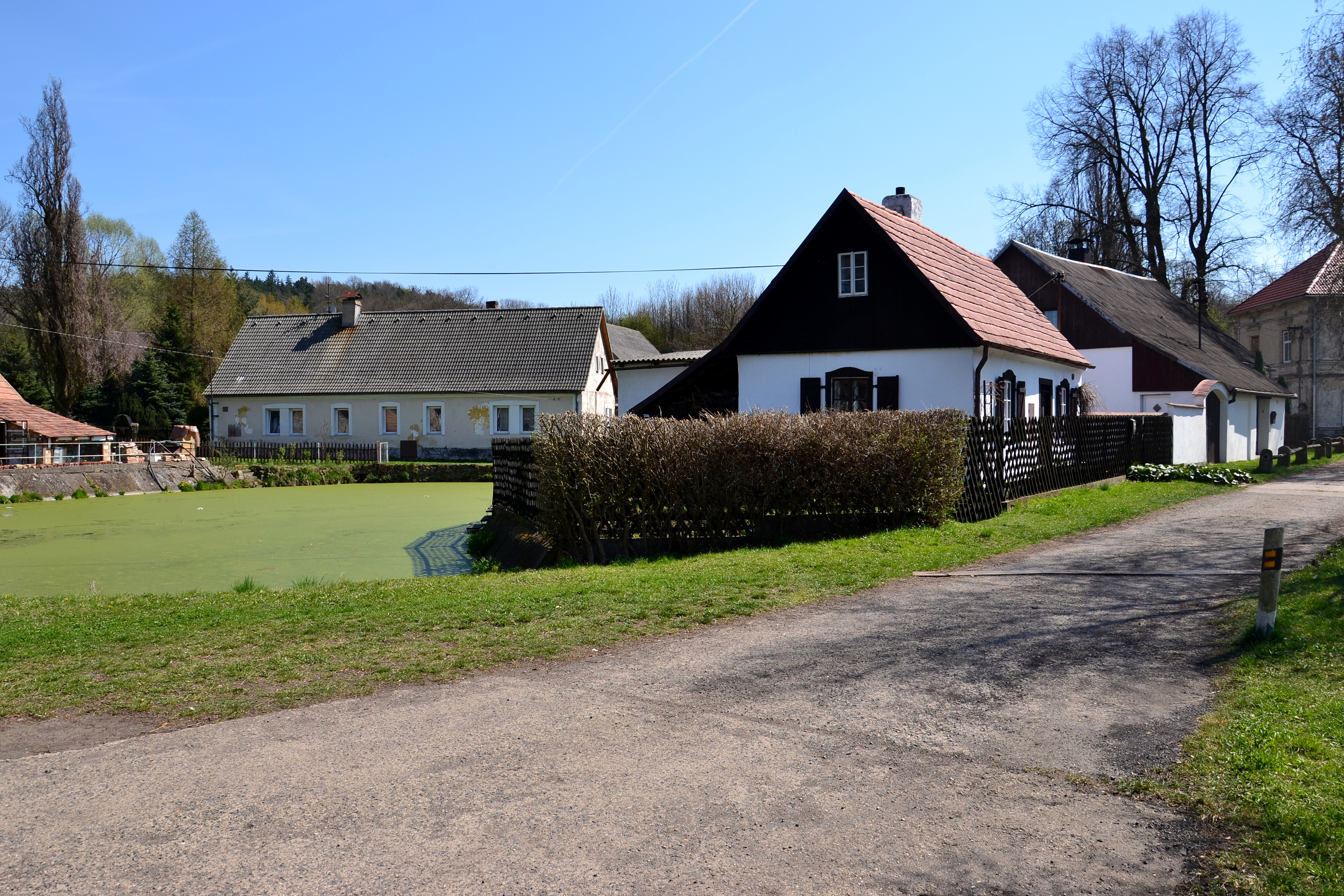 Radechov - rybník uprostřed vesnice